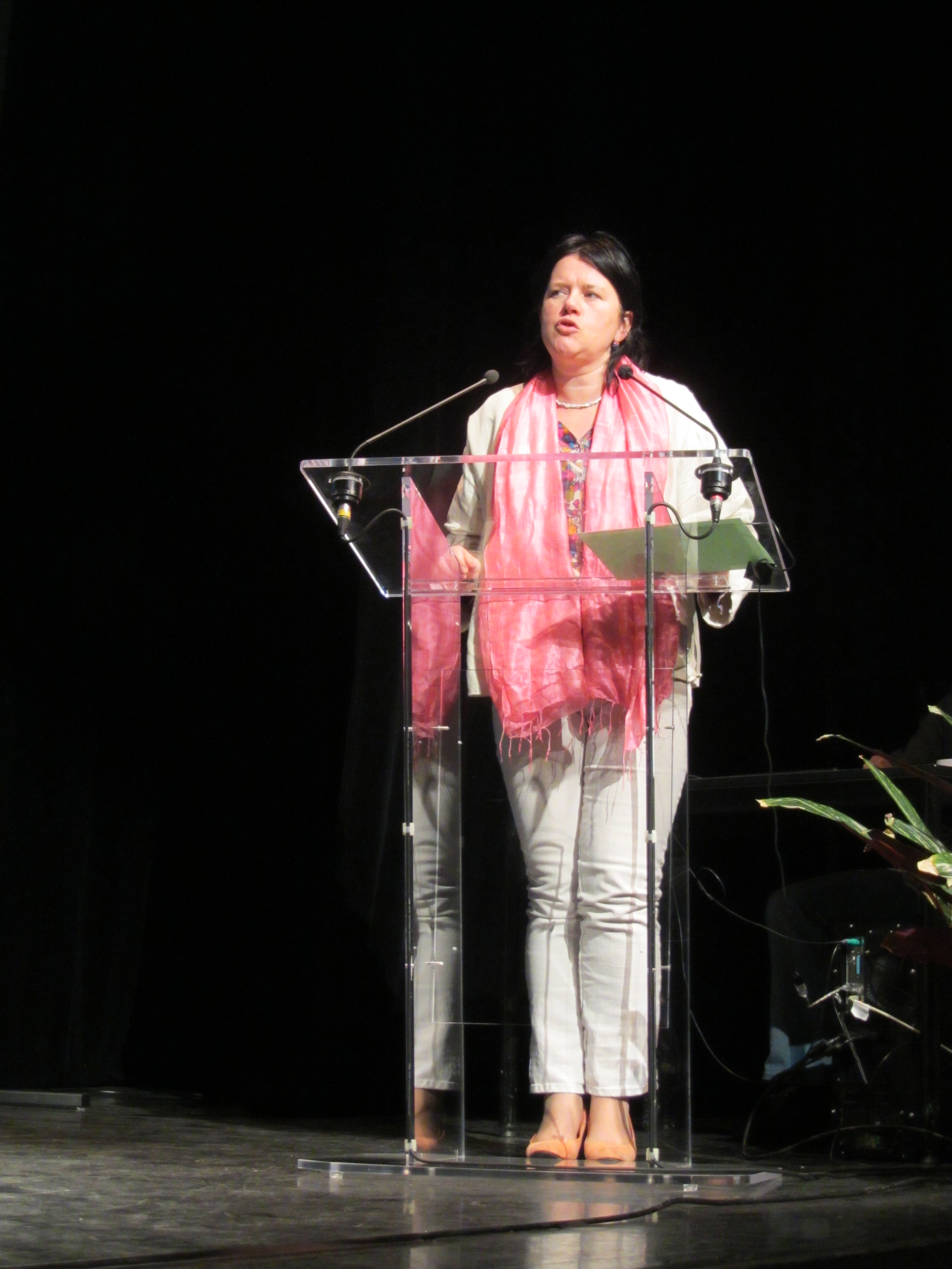 Patricia Andriot, vice-présidente du Conseil régional de Champagne-Ardennes, introduisant le colloque "Depuis Diderot, la campagne innovante", Langres, 6 avril 2013